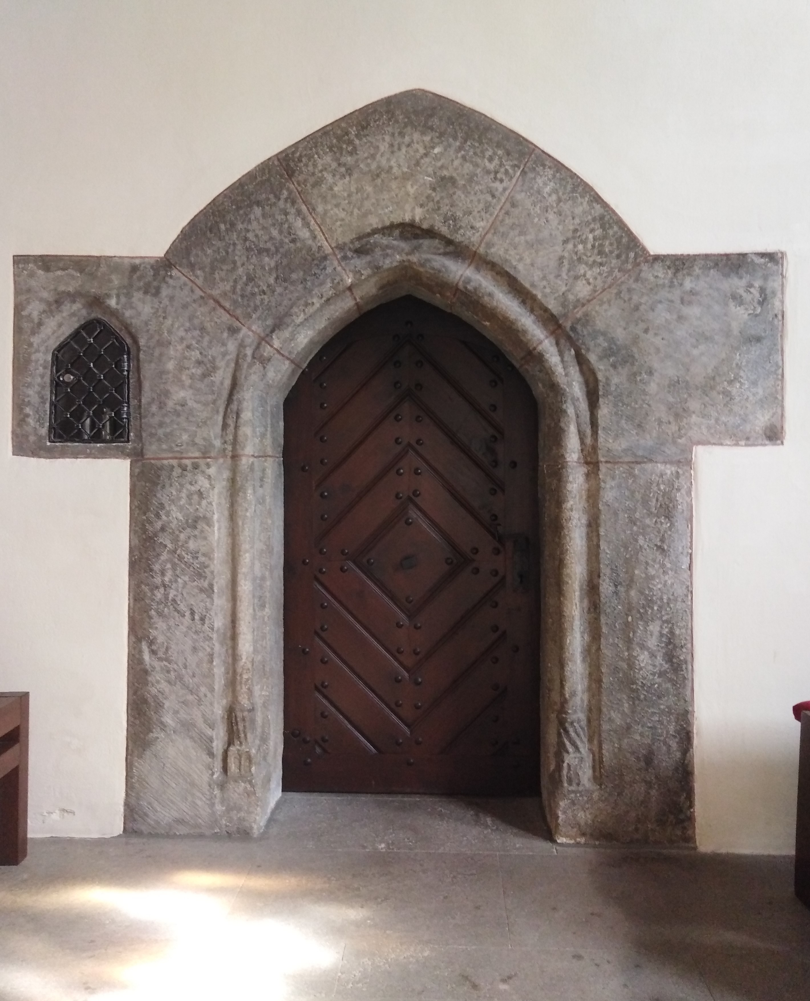 Aufgang zum Turm St. Mauritius